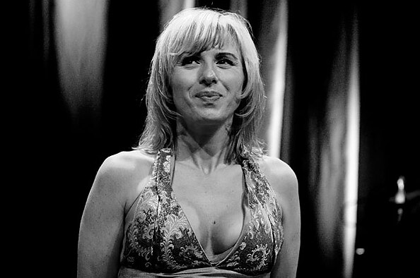 Silje Nergaard at Lantaren/Venster, Rotterdam.